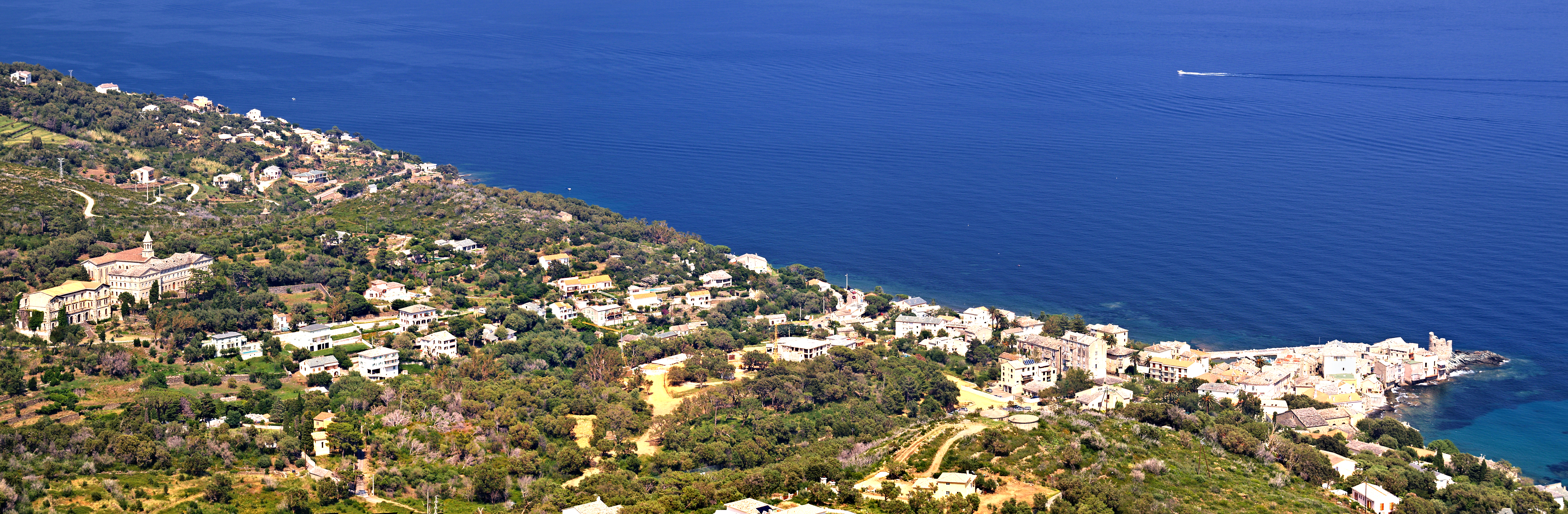 Brando - Panorama sur Erbalunga